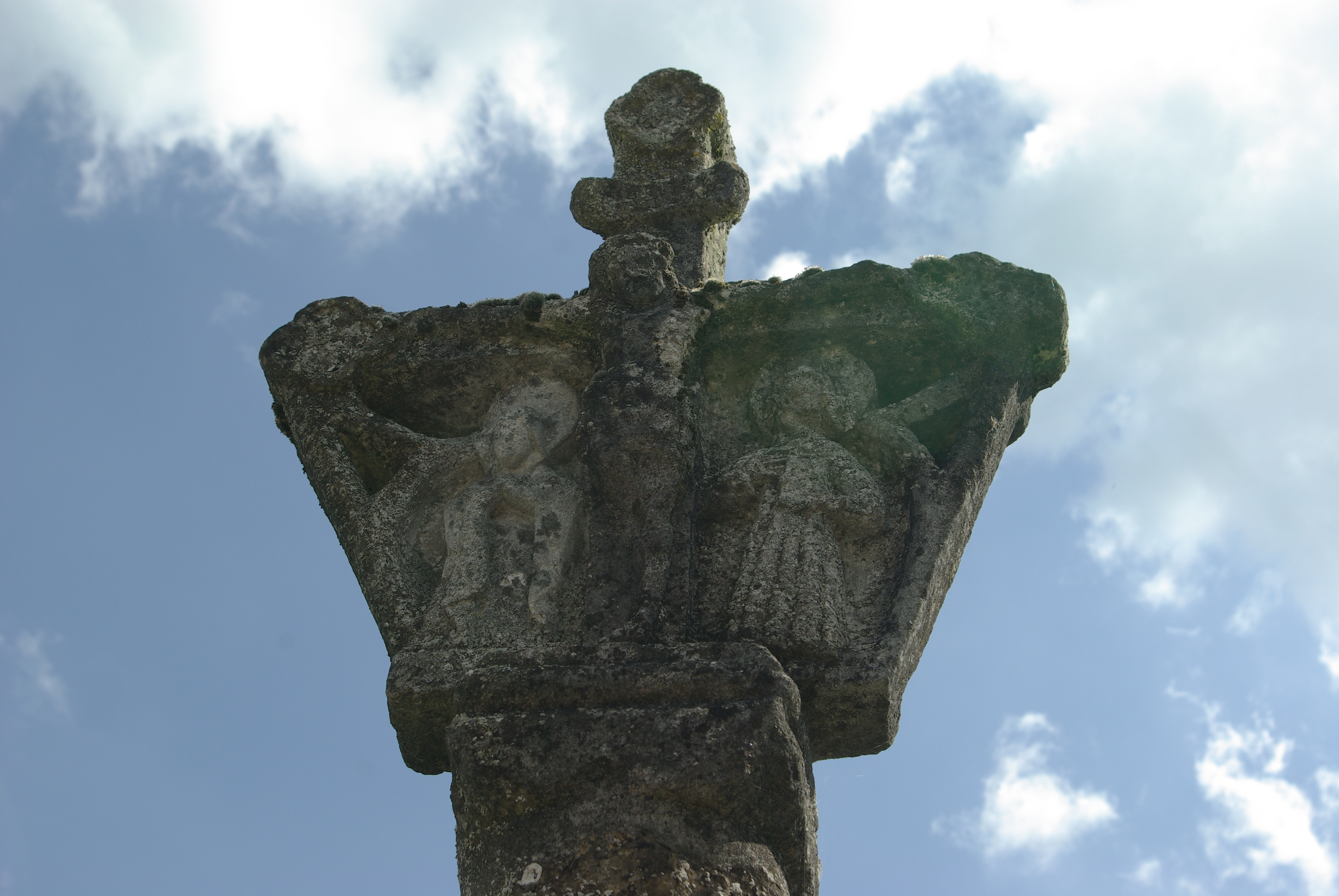 Croix de Belmont-sur-Vair (88) - détail .